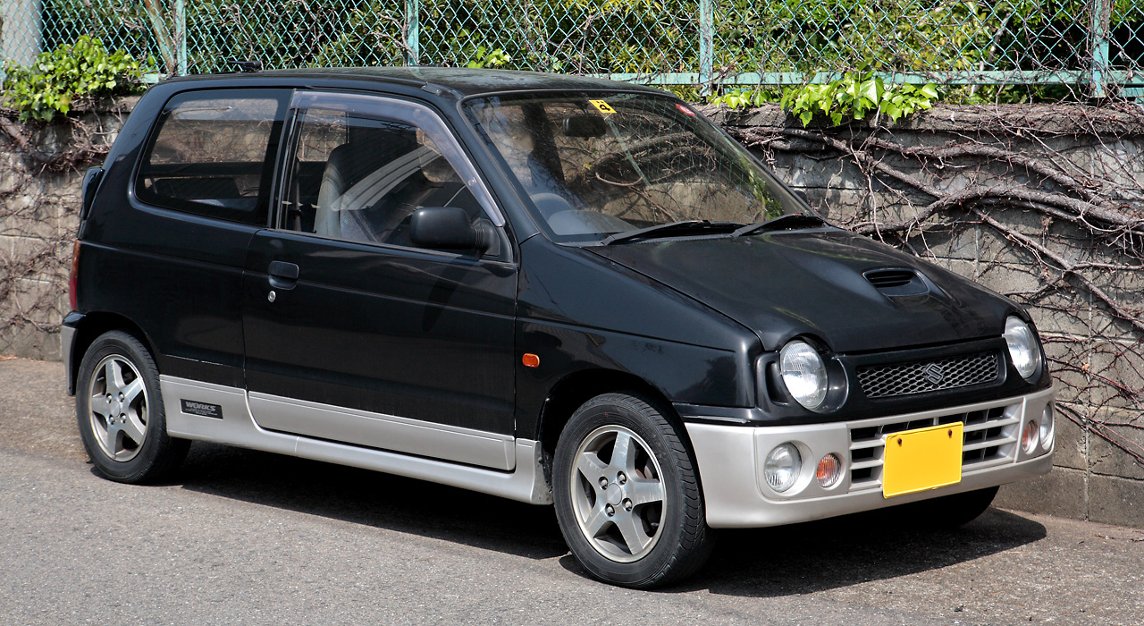 Suzuki Alto Works 660 RS/Z ( HA21S )